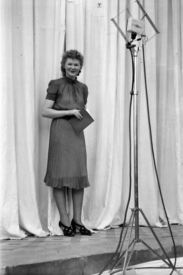 Schloss Güterfelde, Truppenbetreuung: Carsta Löck